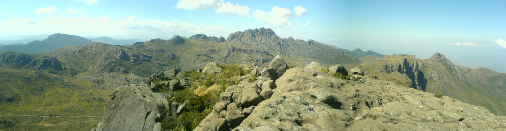 Vista panorâmica do Planalto do Itatiaia do cume do Pico do Couto. Ao centro vê-se o Pico das Agulhas Negras, à direita o Prateleiras. Outros picos e locais conhecidos (Altar, três picos, asa de hermes podem ser vistos na imagem também.